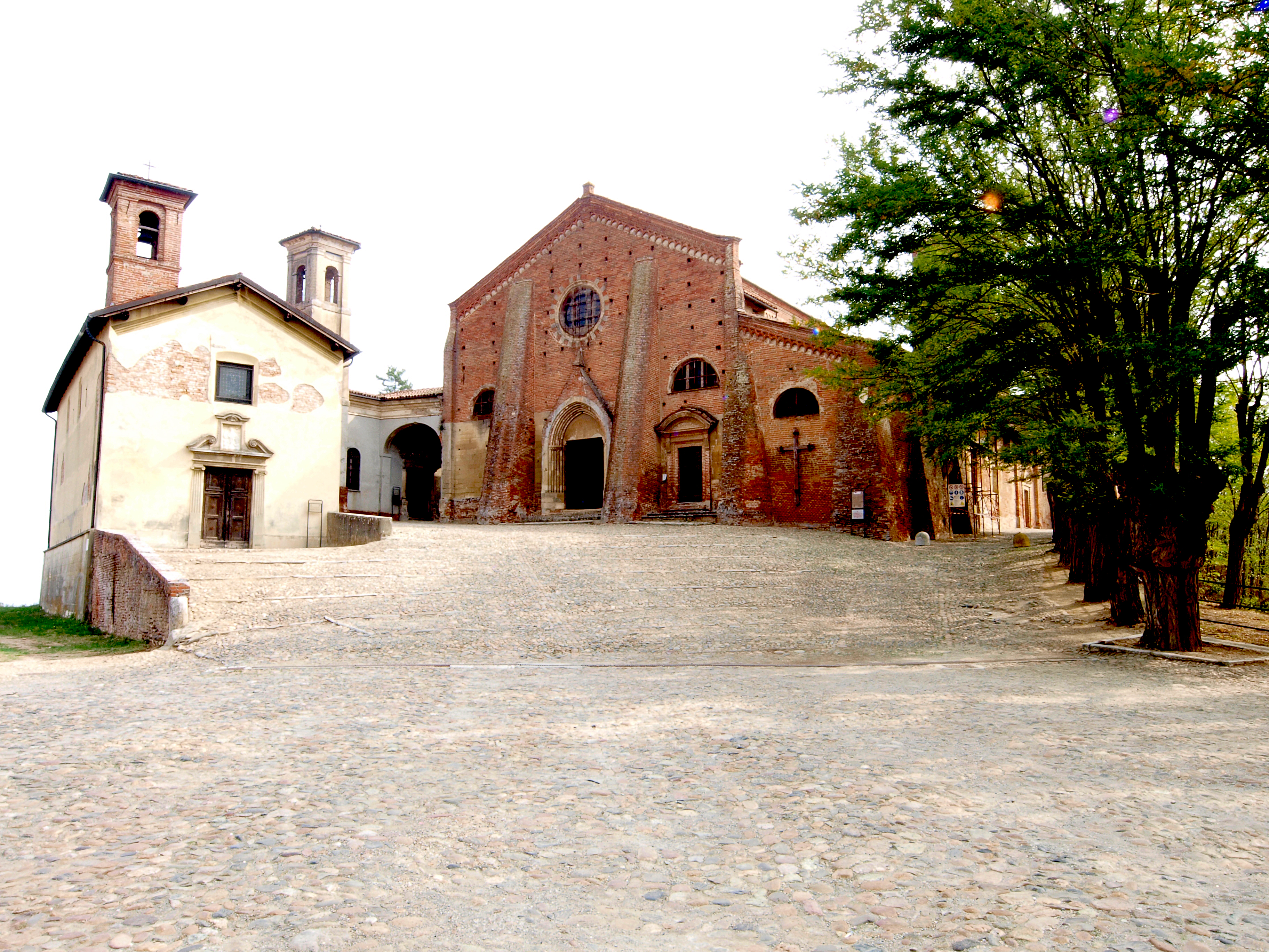 Chiesa di San Francesco This is a photo of a monument which is part of cultural heritage of Italy.